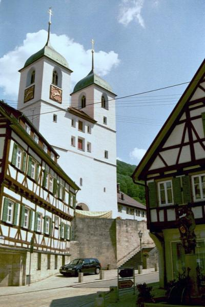 Stiftskirche St. Cyrakus in Wiesensteig.